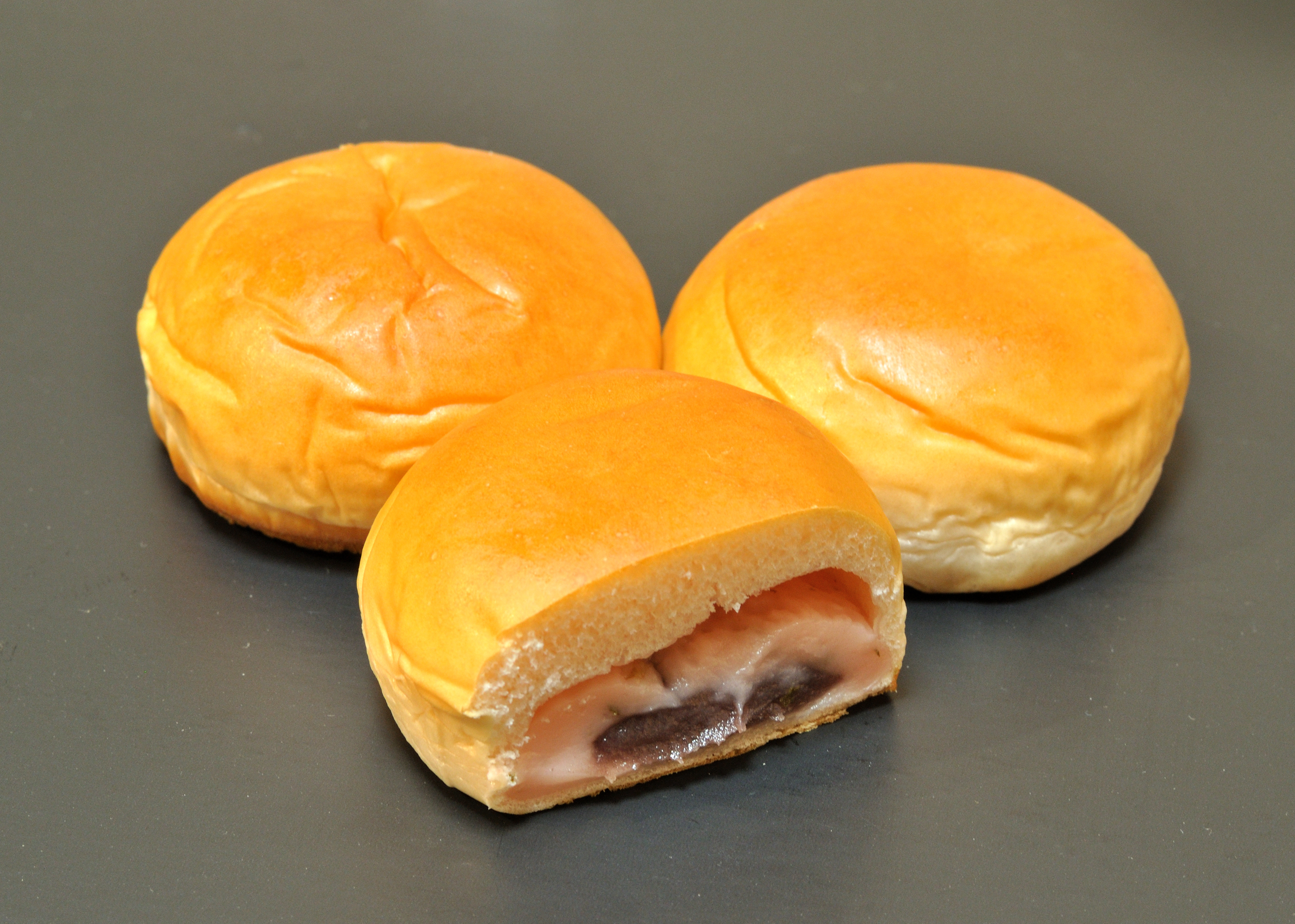 山崎製パンが製造する薄皮ミニパンシリーズの桜風味クリーム&こしあんぱん